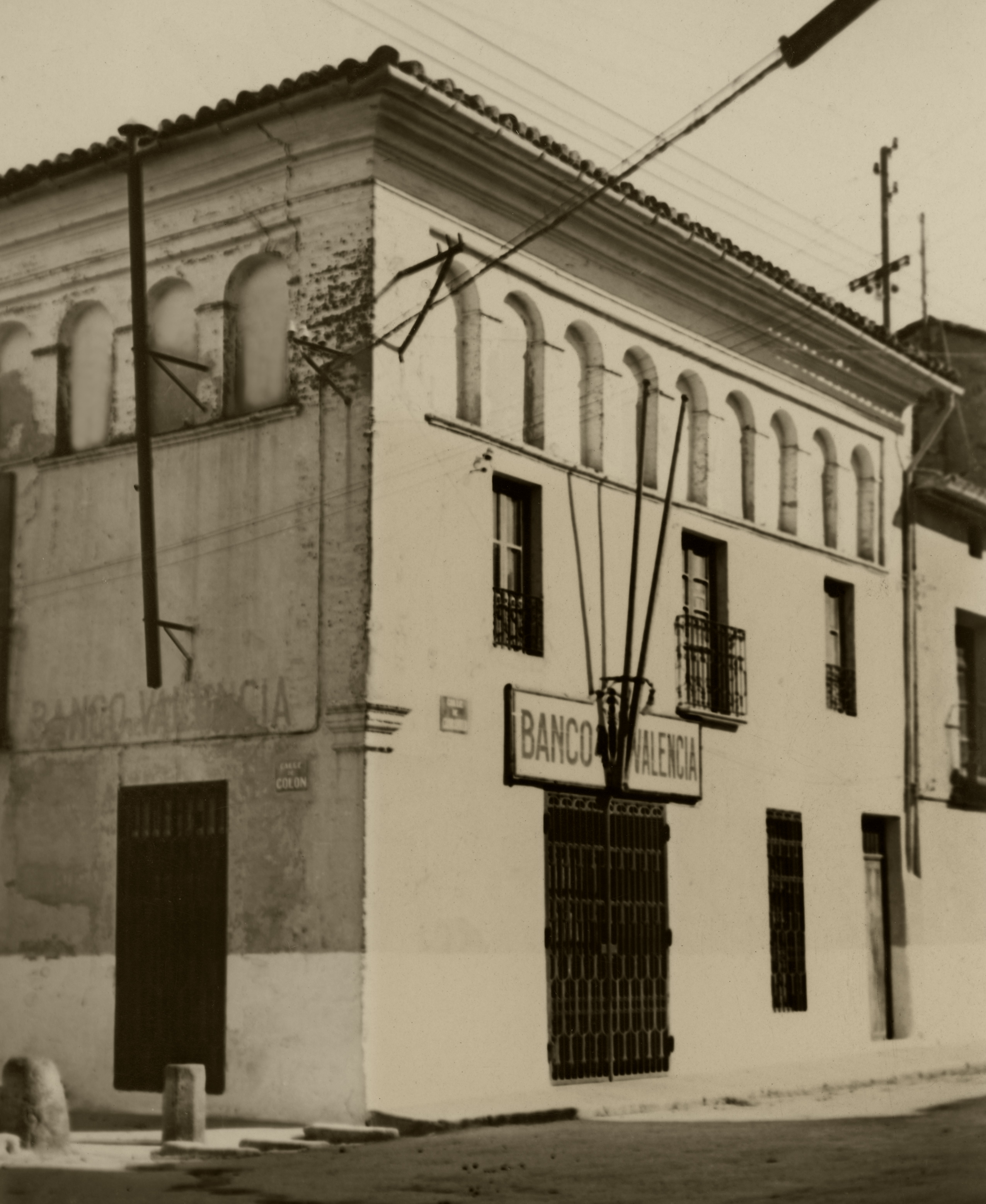 Fotografia d'Ismael Latorre Mendoza, 20-05-1951. L'edifici va ser enderrocat a mitjans dels anys 70. Feia de cantonada entre el carrer Colom i el carrer Major. Després del seu enderrocament, la casa cantonera va ser la d'Ismael Latorre Mendoza i Laura Canet Lozano, justament la botiga dels fotògrafs. S'hi troben altres fotografies de l'Arxiu d'aquest edifici, publicades en: LOZANO, Josep i altres. Aljannat III. Monogràfic: Ismael Latorre Mendoza, any 2008. Edita: Ajuntament d'Alginet; ISSN 1886-984 X, p.117. Imatge amb data: 27-08-1963. L'article està signat per Rafael Bosch López. FORNÉS, Alberto; Císcar, José i Latorre, Ismael: Alginet, històries, costums i altres relats, Societat Cultural Alèdua, Alginet, 2003. Dipòsit Legal: V-2546-2003, p.155. Imatge amb data: 30-04-1959 BOSCH LÓPEZ, Rafael: L'urbanisme d'Alginet entre els segles XII-XX. Edita: Ajuntament d'Alginet; 2019. Dipòsit Legal V-1250-2019 ISBN 978-84-09-10894-7 Pàgina 89. Imatge amb data: 27-08-1963, publicada pel mateix autor en Aljannat III.